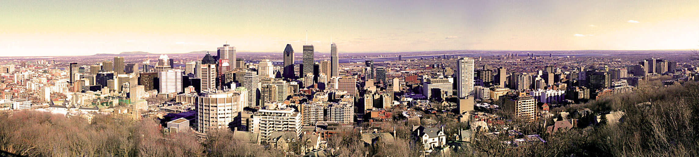 Vue panoramique de Montréal vue du Mont-Royal en hiver.